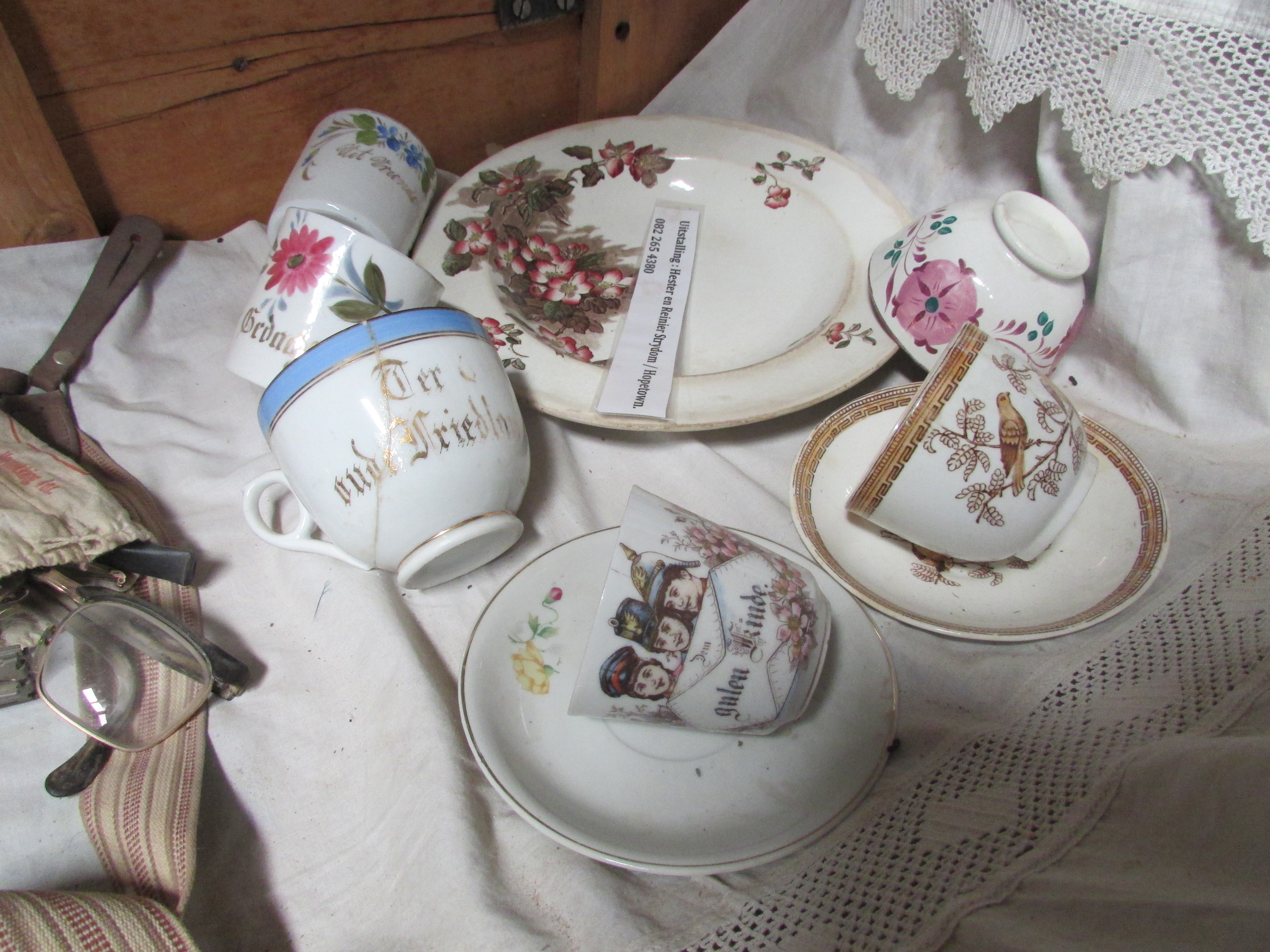 Voorwerpe op uitstalling in die terreinmuseum